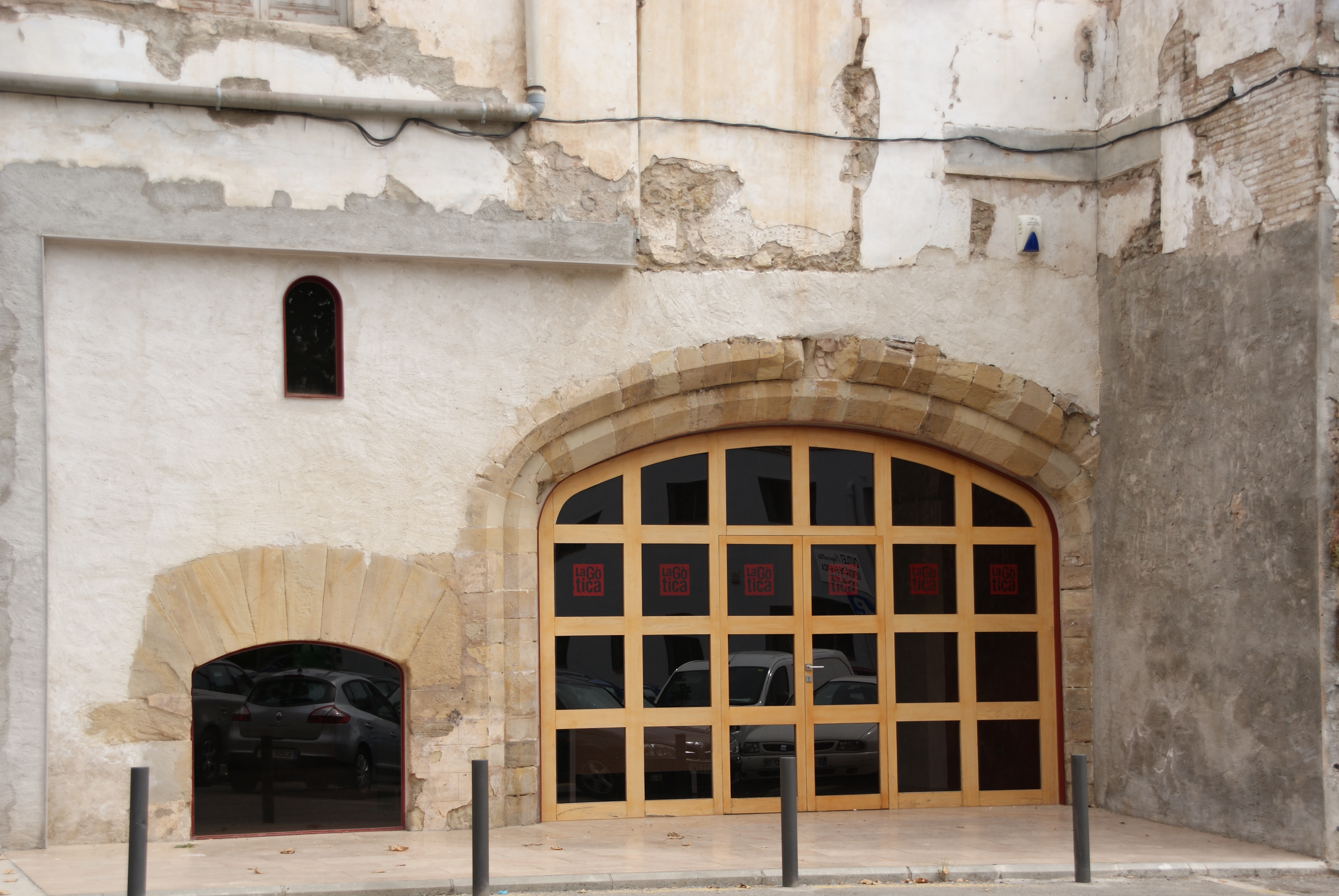 Palau dels Requesens (Molins de Rei). entrada Sala Gotica